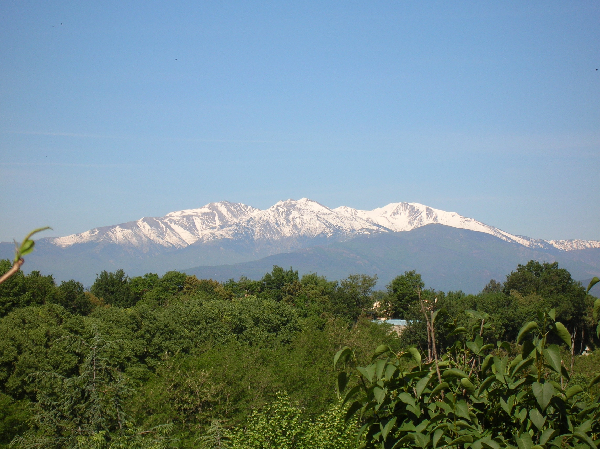 le Canigou